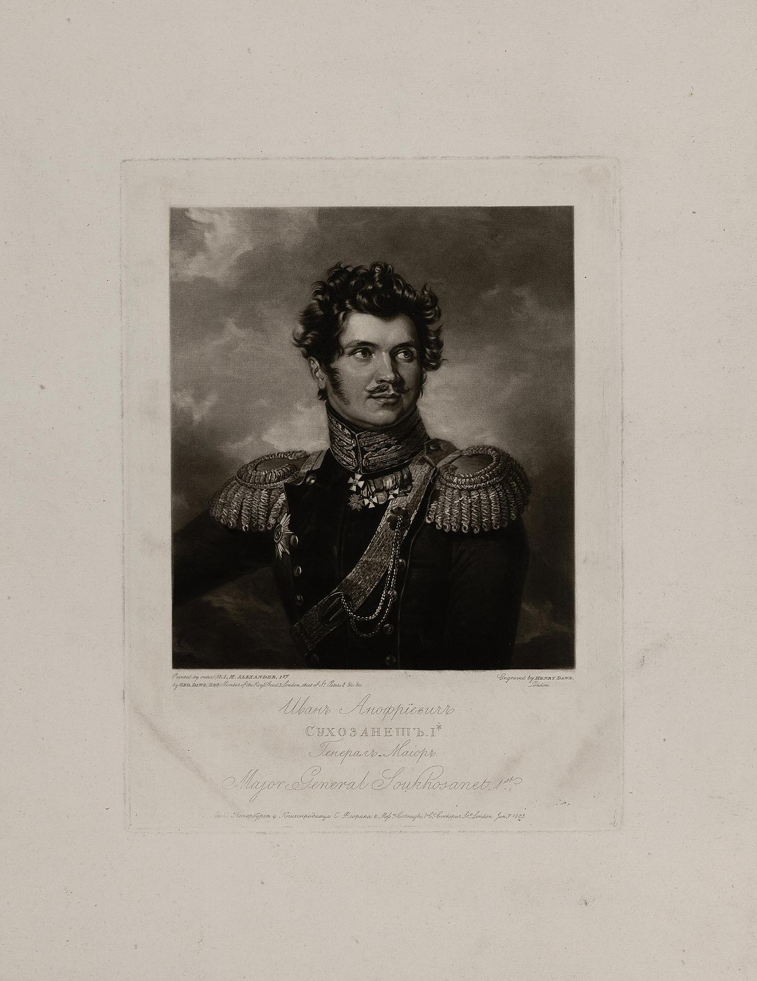 Портрет генерала И. А. Сухозанета 1-го